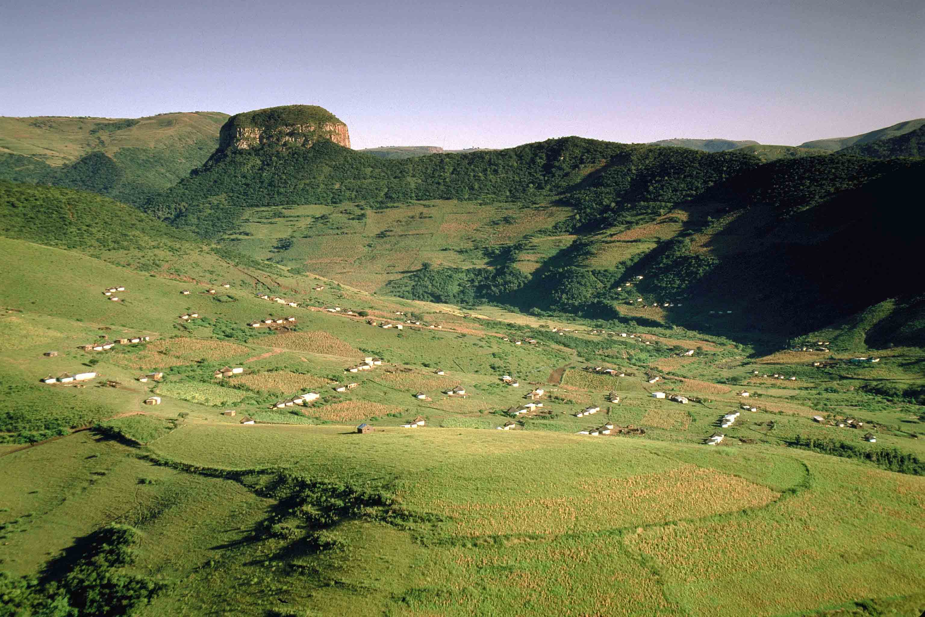 Mountain Pass in South Africa Vue de l'Eastern Cape en Afrique du Sud.